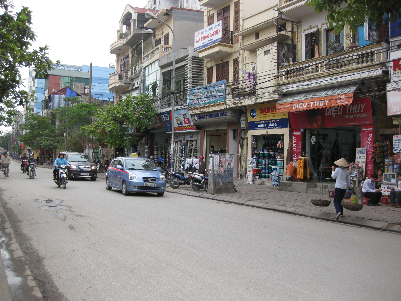 Nguyễn Khuyến street in Hanoi.